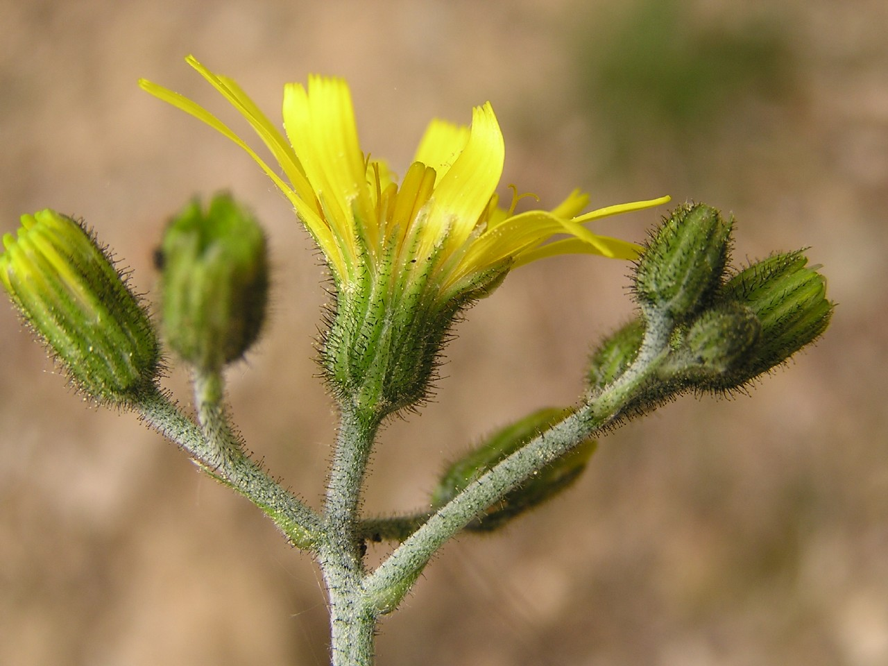 Hieracium murorum im Ahrtal.